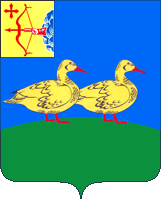 Герб Яранска